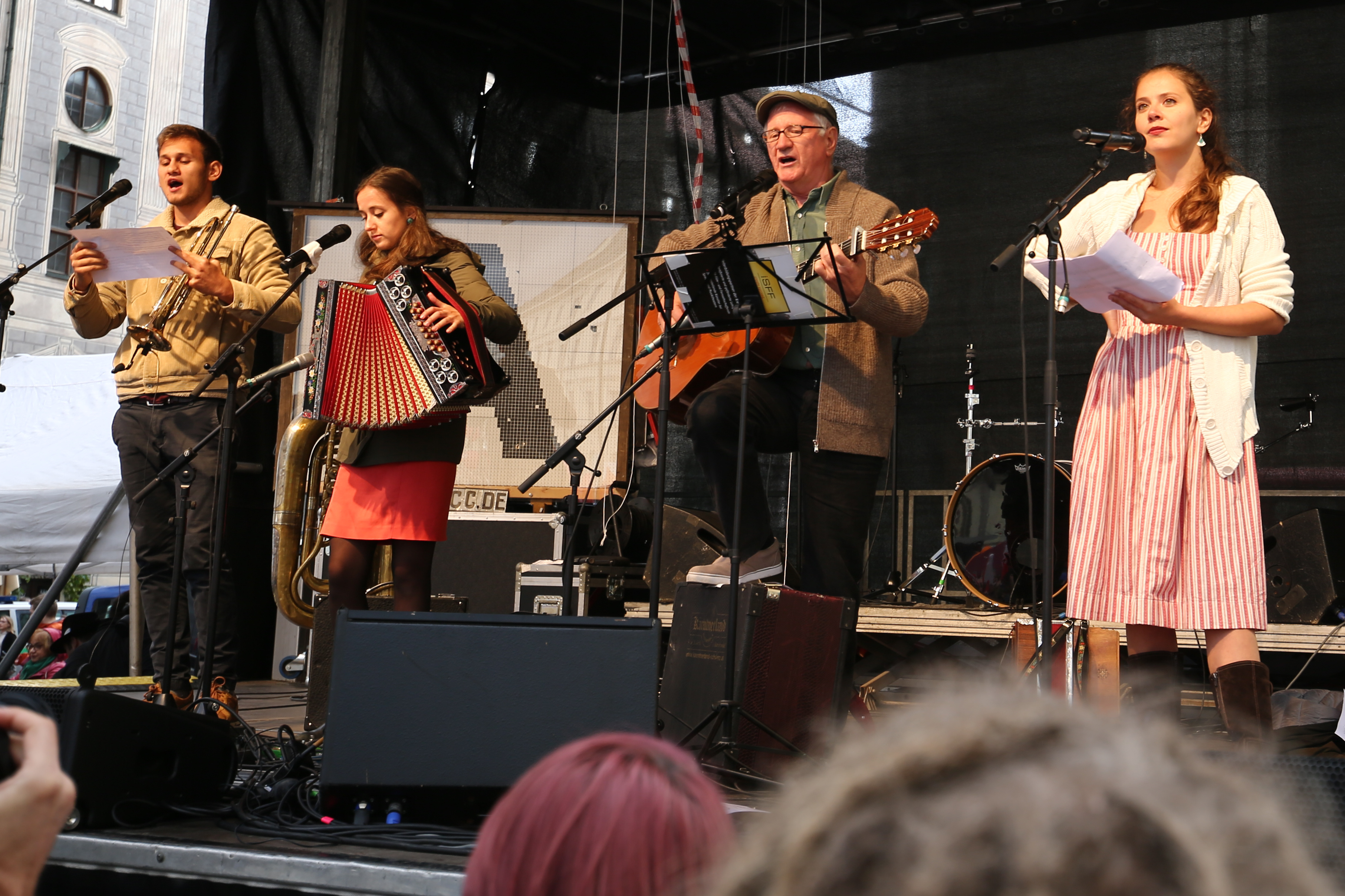 Hans Well und Wellbappn am 2018-10-03 auf dem Münchner Odeonsplatz